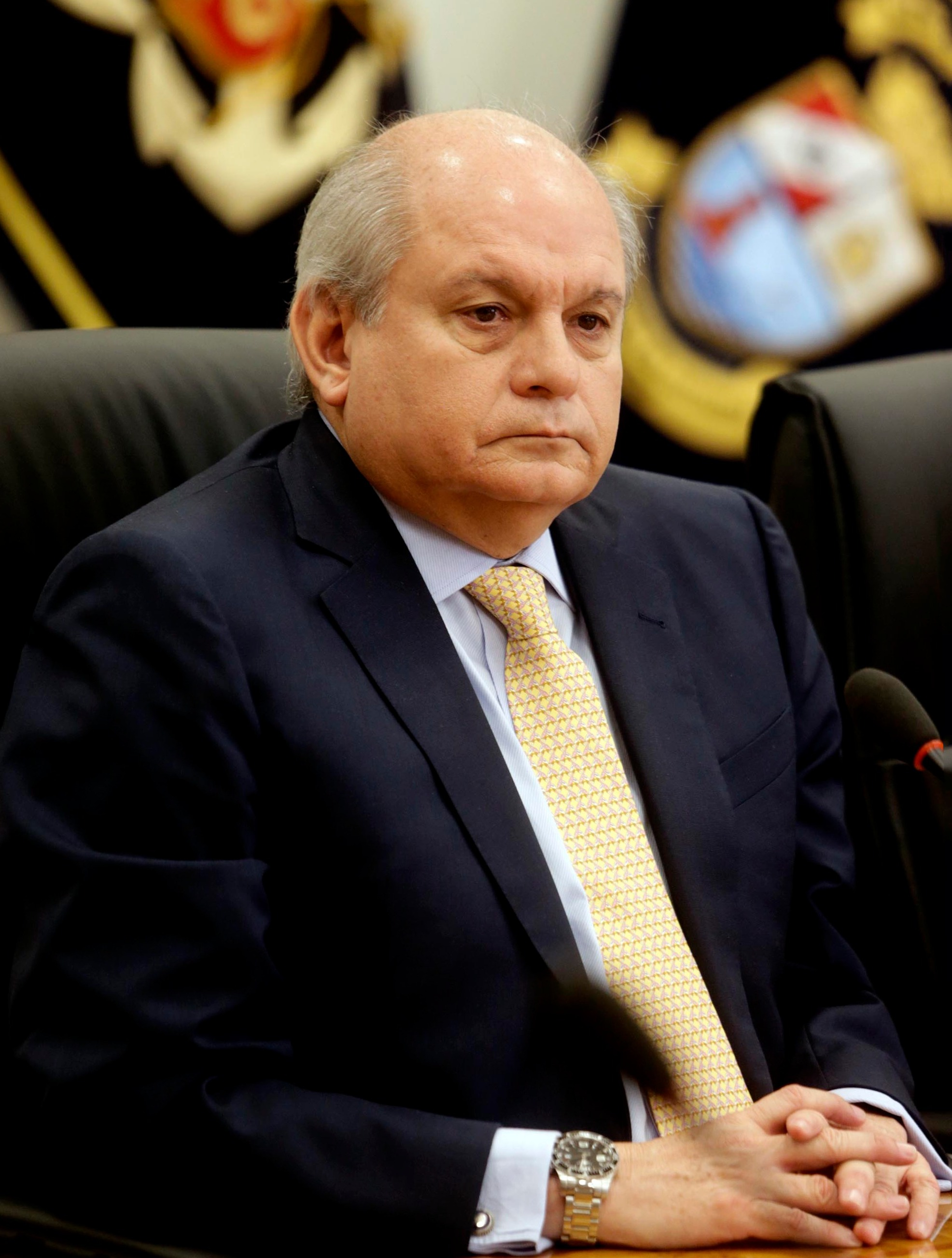 La Marina de Guerra del Perú concesionará aproximadamente 42 hectáreas de la Base Naval del Callao, operación que favorecerá el desarrollo portuario del primer puerto y generará ingresos para modernizar bases operativas navales. El ministro de Defensa, Pedro Cateriano Bellido, acompañado del comandante general de la Marina, Almirante Carlos Tejada, explicó que el proceso se hará de forma técnica y transparente, a través de ProInversión.